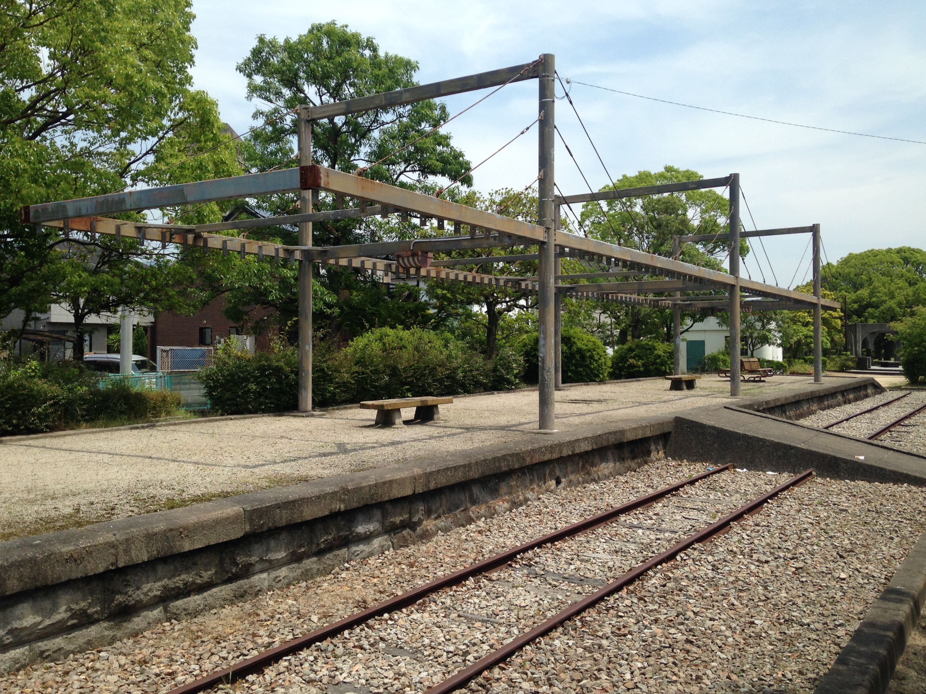 志免鉄道記念公園・旧志免駅跡